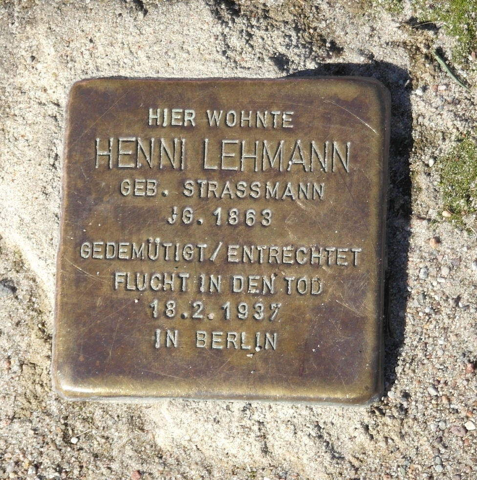 Stolperstein für Henni Lehmann in Vitte, Gemeinde Insel Hiddensee